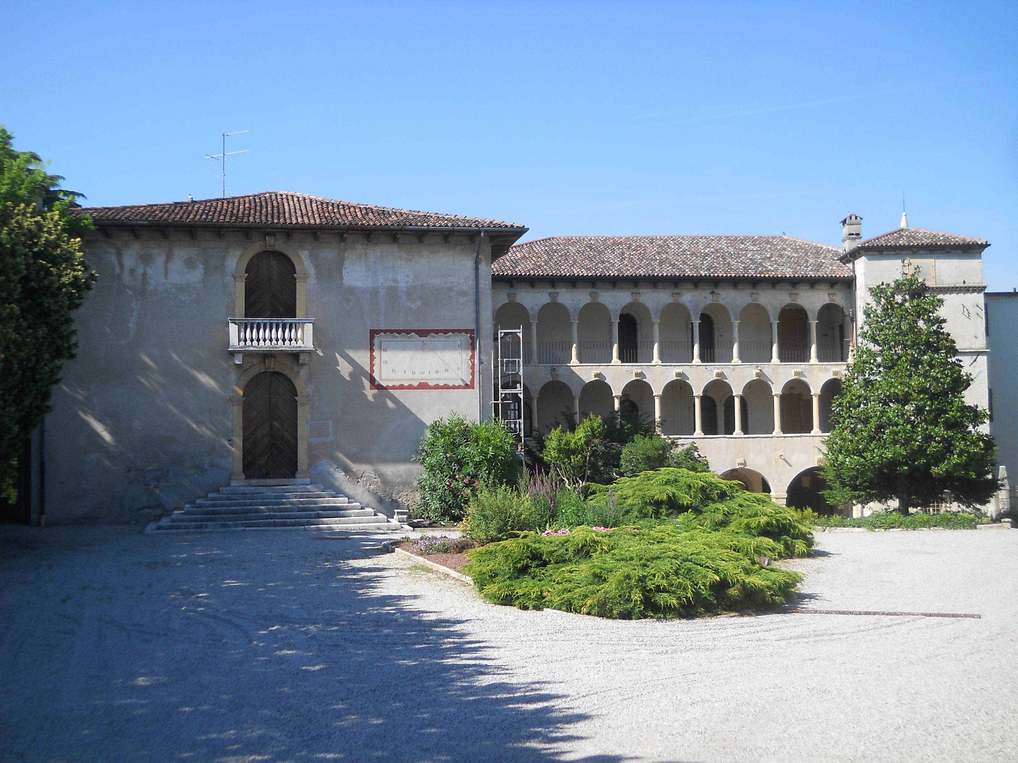 Facciata della villa Spinola a Bussolengo